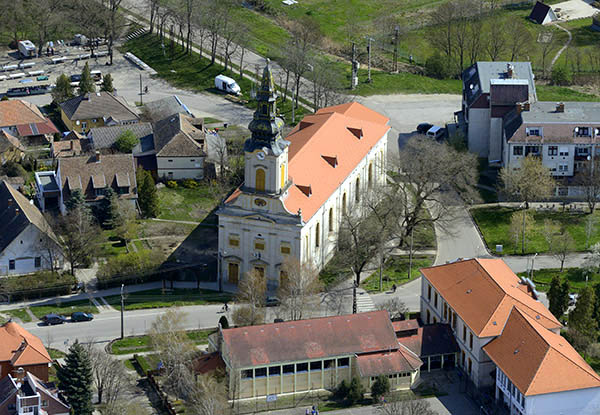 Légi fotó Túrkevéről